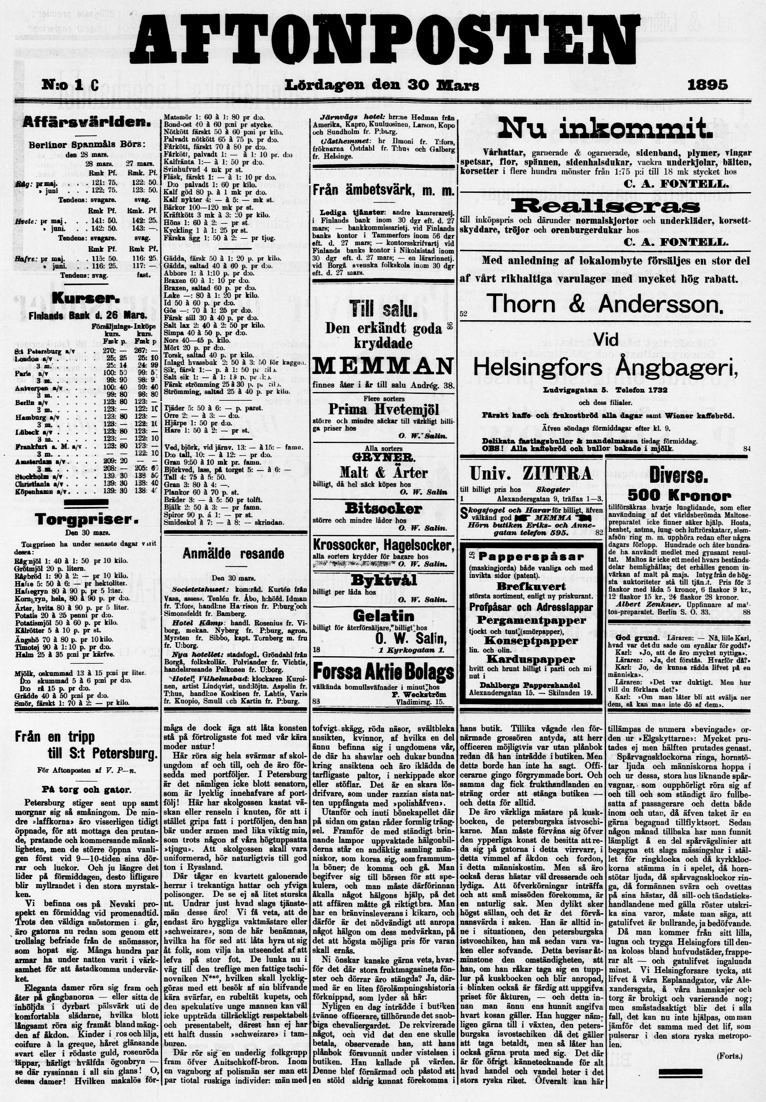 Första numret av Aftonposten, del C